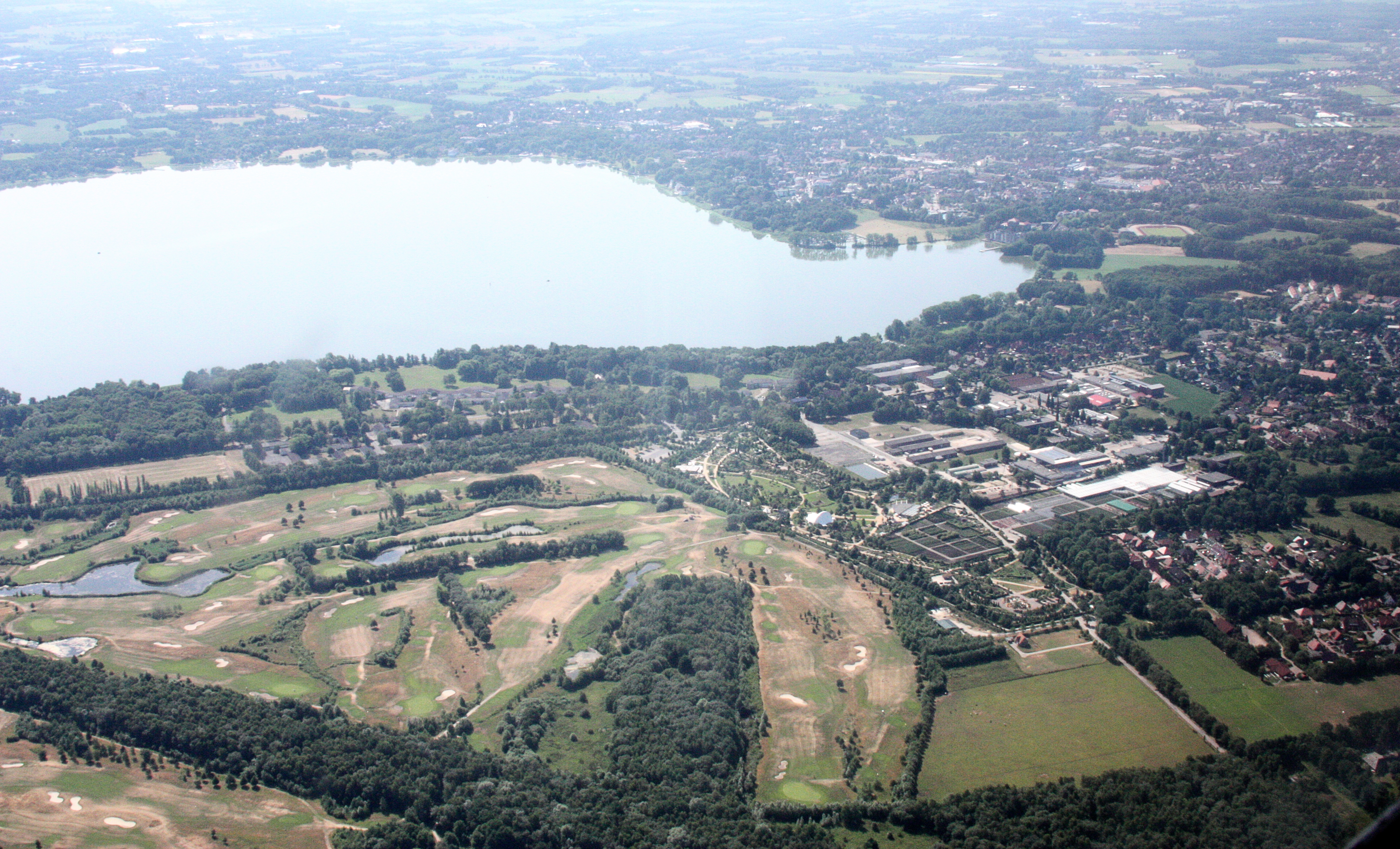 Flug von Oldenburg (Oldenburg) nach Bad Zwischenahn und zur Landesgartenschau ; Flughöhe 1500 ft; Juli 2010; Originalfoto bearbeitet: Tonwertkorrektur und Bild geschärft mit Hochpassfilter